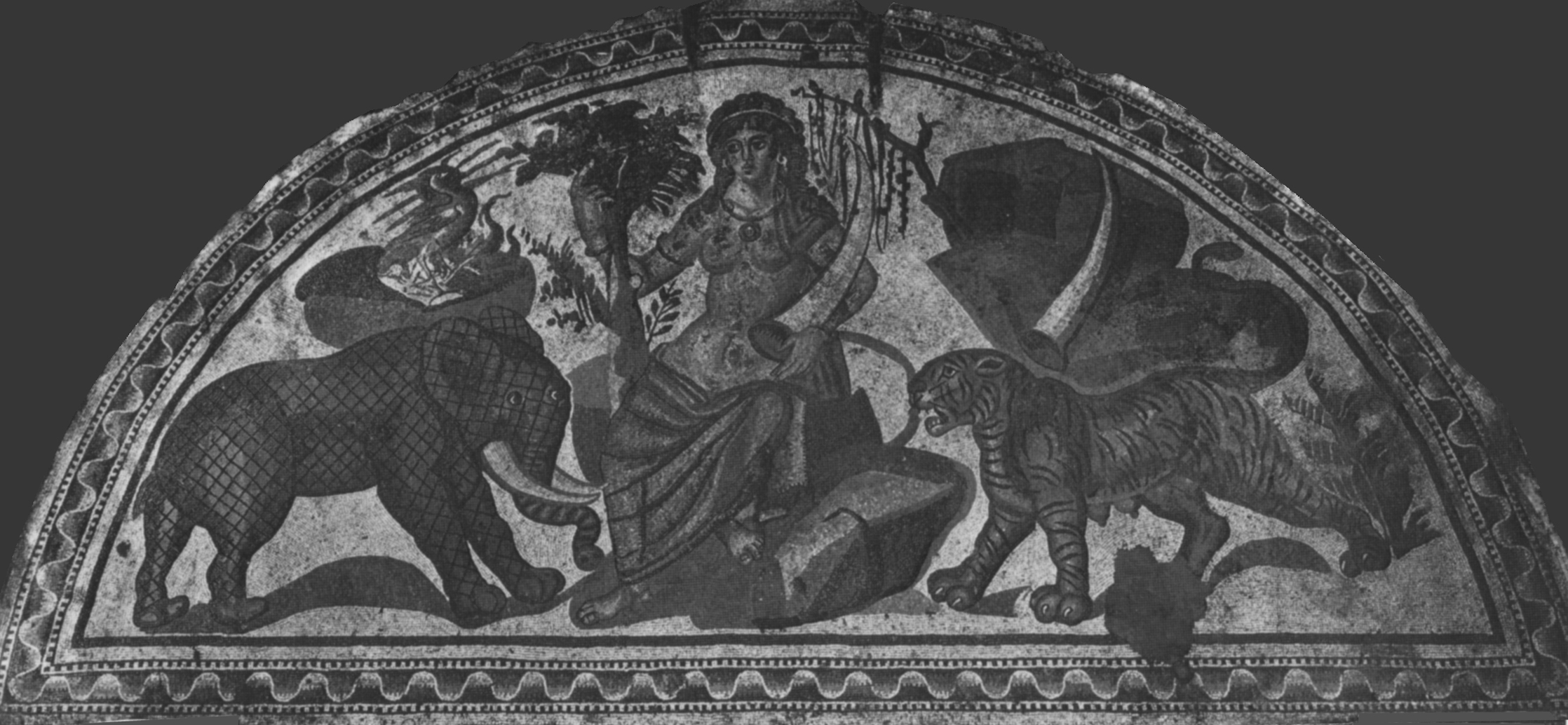 Mosaico della grande caccia 03, egitto o asia